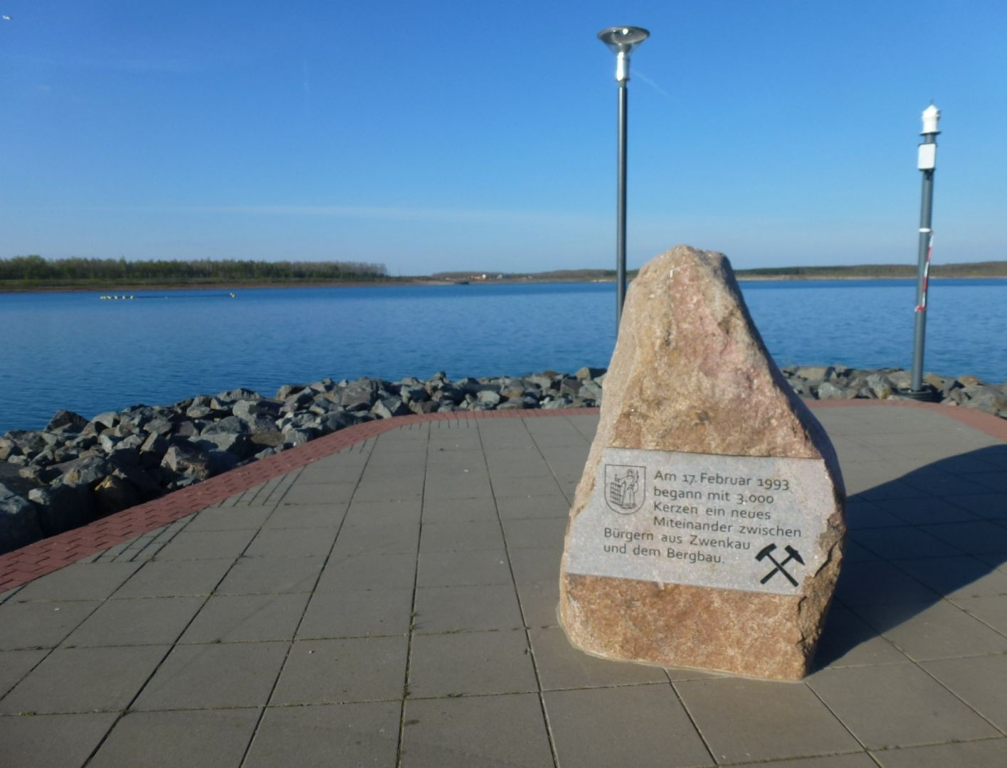 Gedenkstein am Zwenkauer Hafen